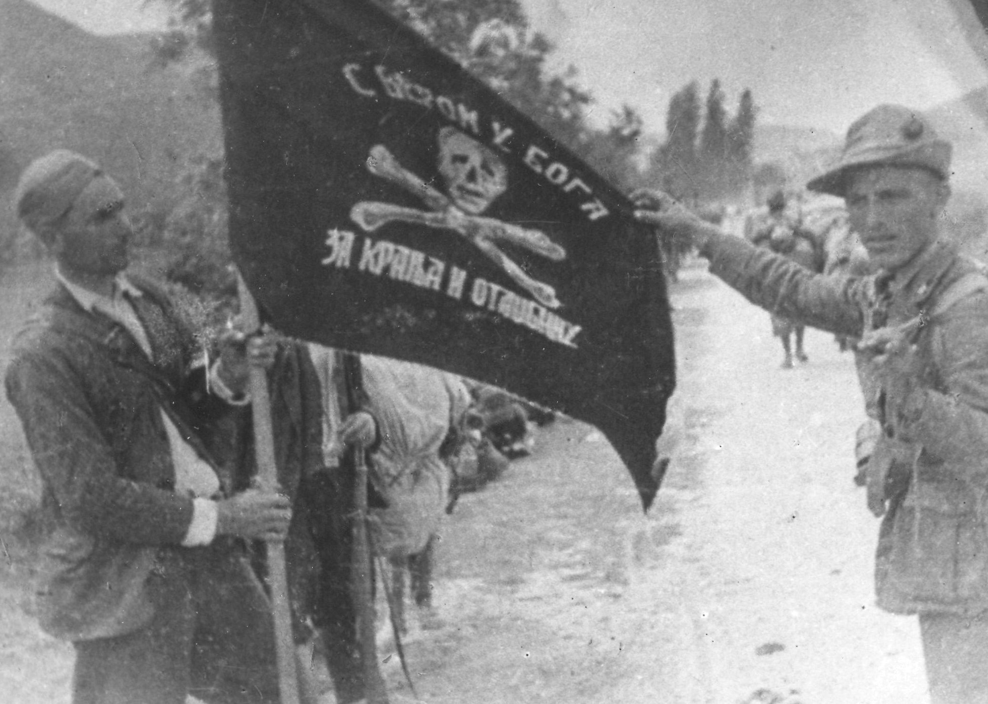 Srpskohrvatski / српскохрватски: Četnik i Italijan drže četničku zastavu u okupiranoj Jugoslaviji.